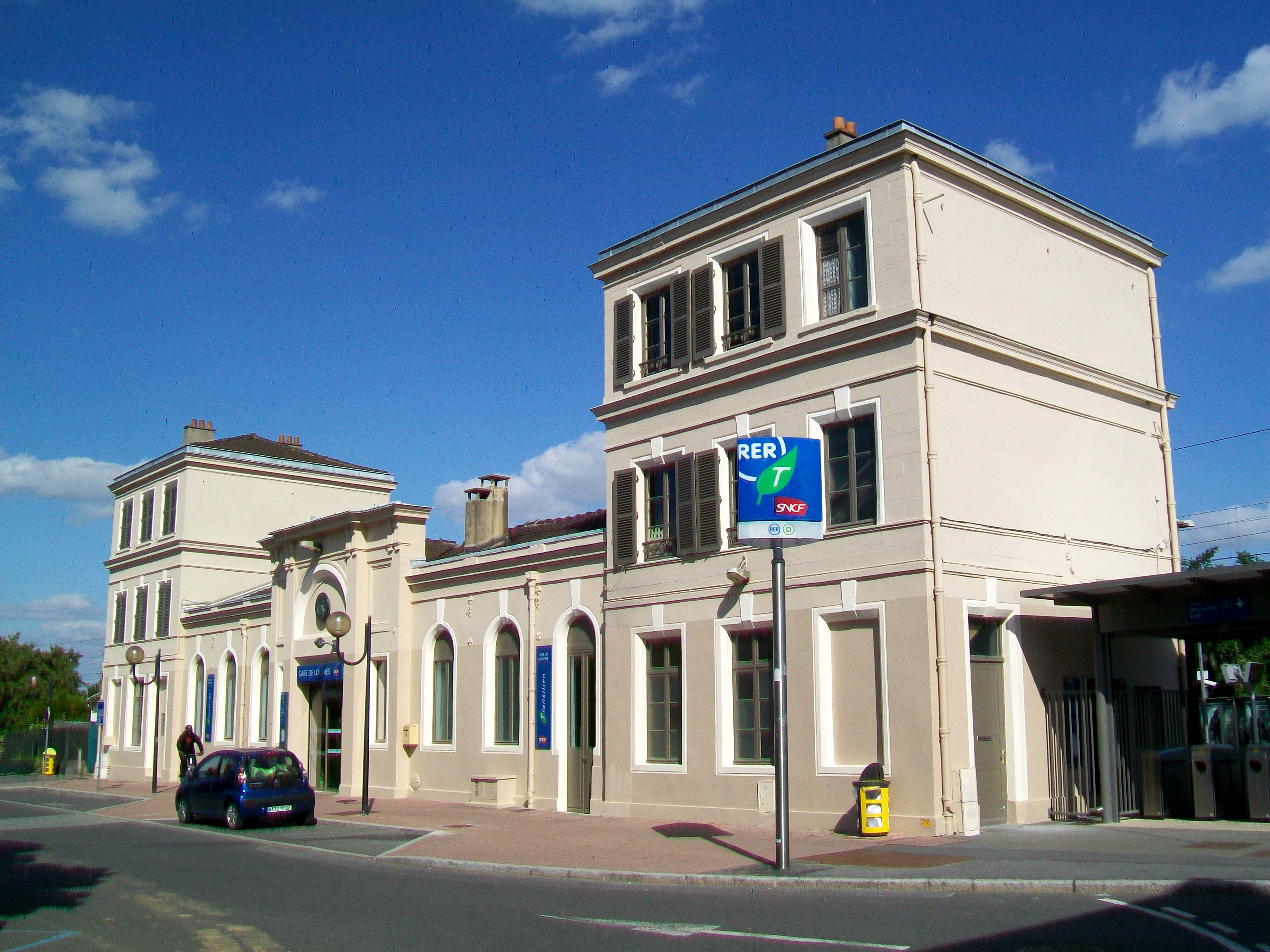 La façade du bâtiment voyageurs sur la cour, après la rénovation de 2009.